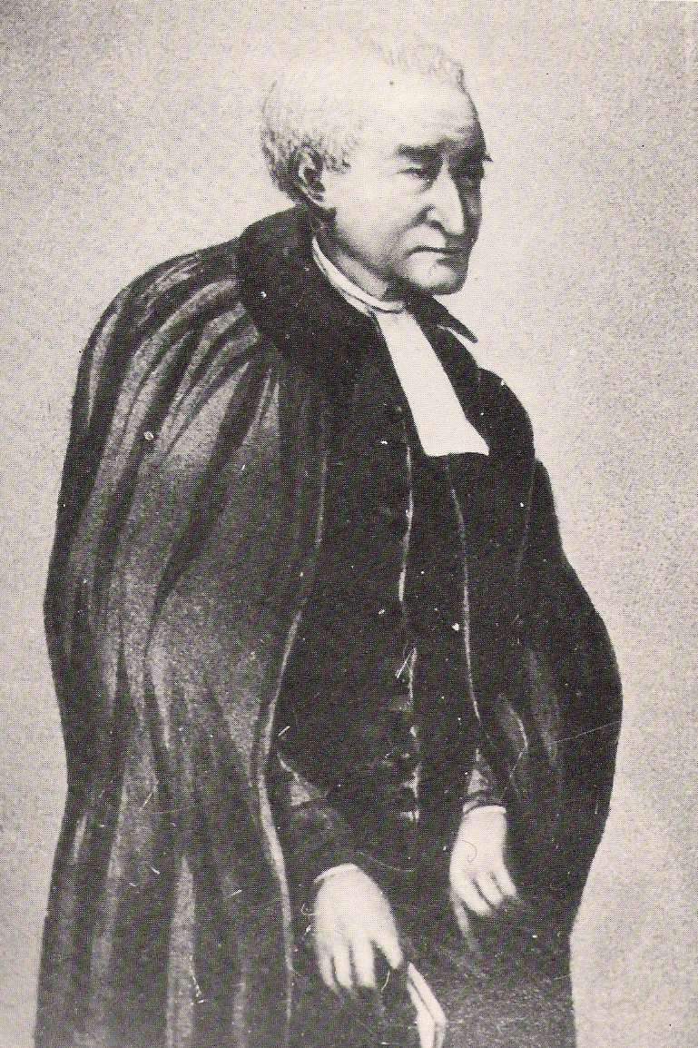 Geretoucheerde foto van een door H.A. Luitwieler geschilderd portret van de predikant Huibert Jacobus Budding (1810-1870). Foto was wijd verspreid in de negentiende eeuw